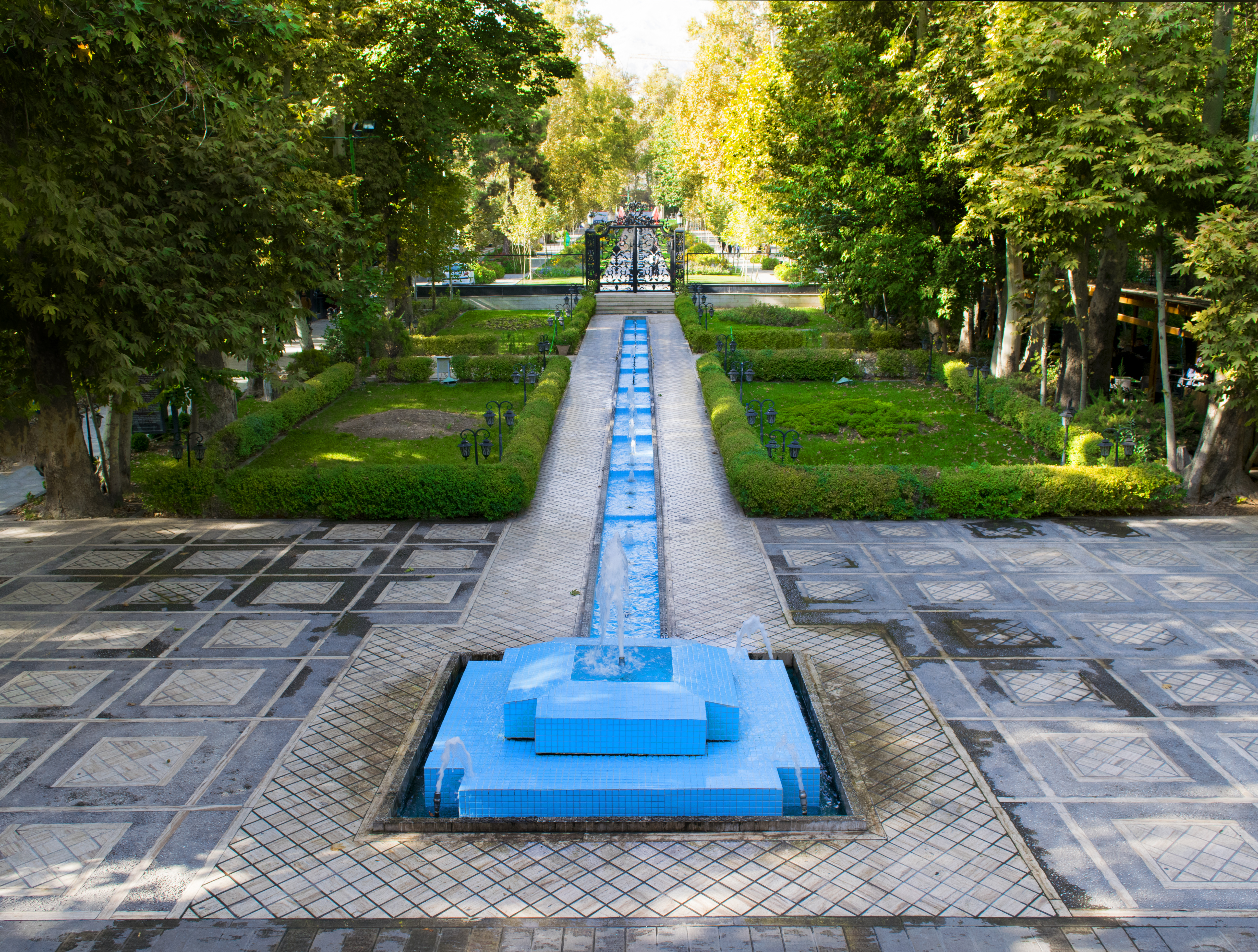 باغ فردوس